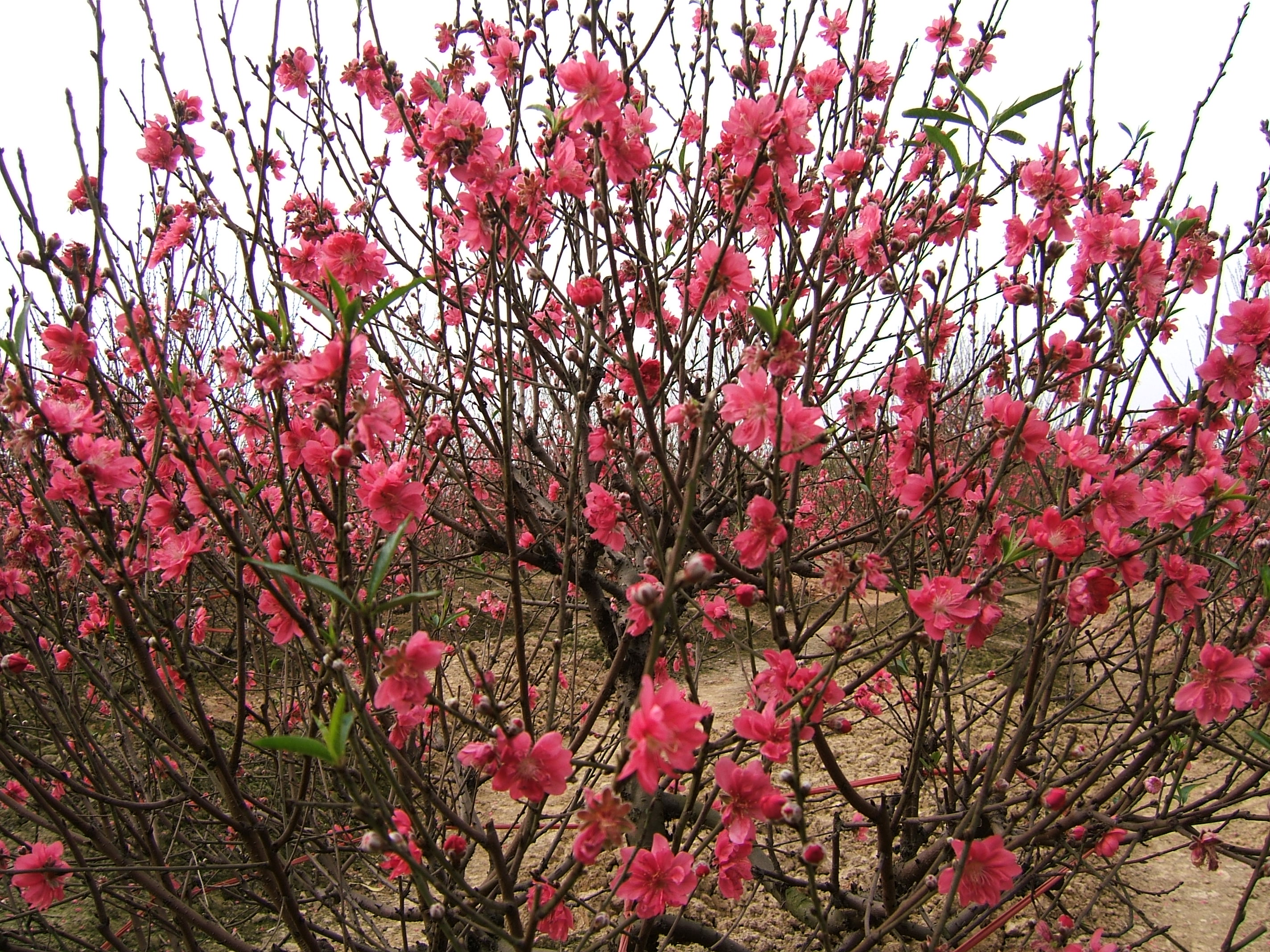 Prunus persica (hoa đào) in Nhật Tân, Hanoi, Vietnam